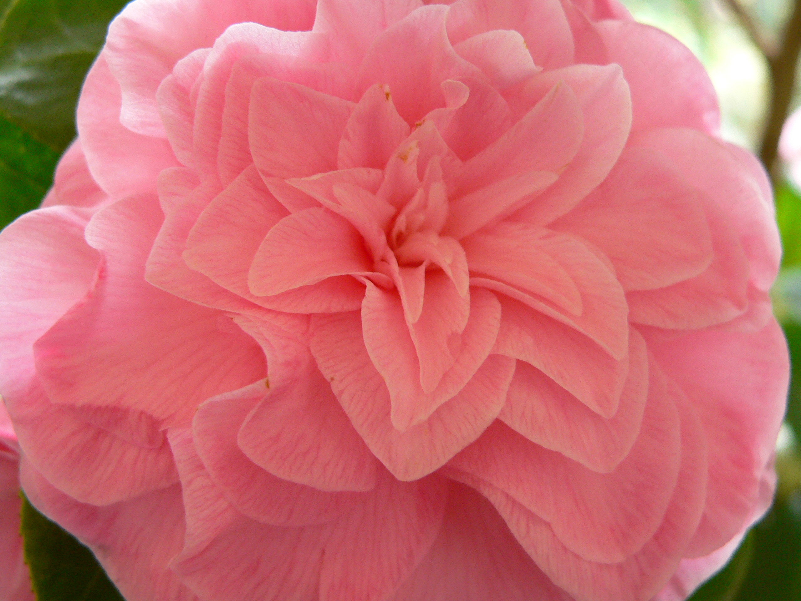 Camellia japonica